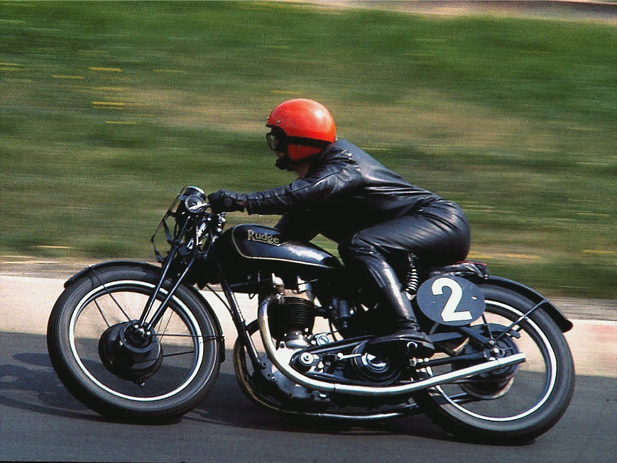 Rudge Ulster Sport, 500 cm³, 45 PS, Baujahr 1938; Südkehre Nürburgring, Fahrer: Gerhard Schöneberg, Geschwindigkeit des Motorrades zum Zeitpunkt der Aufnahme ca. 75–76 km/h. In den Programmheften des AvD-Oldtimer-Grand-Prix von 1976 und 1977 werden für ein und dasselbe Motorrad sowohl 35 PS als auch 45 PS genannt. Auch die Website nennt 45 PS, die jedoch mit der angegebenen Höchstgeschwindigkeit von 100 mph nicht harmonieren. Denn diese Höchstgeschwindigkeit (160 km/h) erreichte eine BMW R 68 von 1952 bereits mit 35 PS.